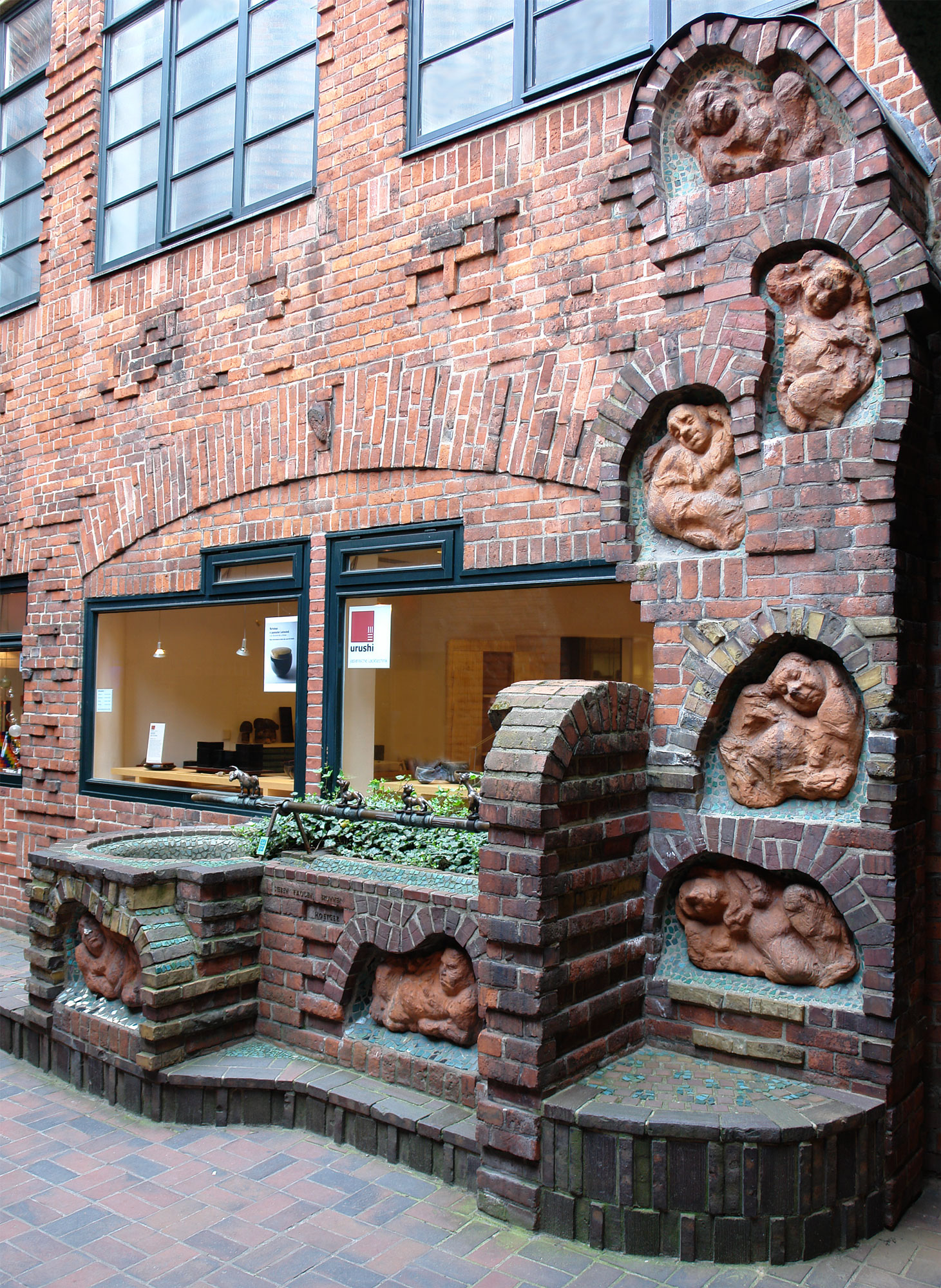 Bernhard Hoetger: Brunnenreliefs Die Sieben Faulen (1927, Terrakotta), Brunnenfiguren Die Bremer Stadtmusikanten (1927, Bronze). Standort: Handwerker-Hof in der Bremer Böttcherstraße